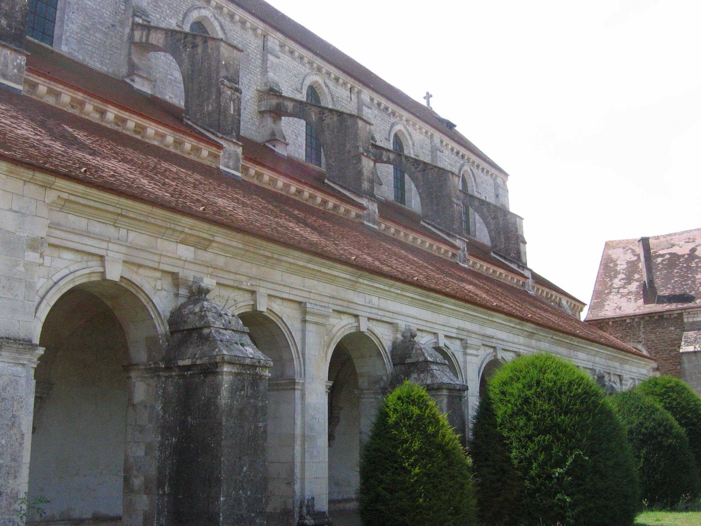 Abbaye de Pontigny, Yonne, France.